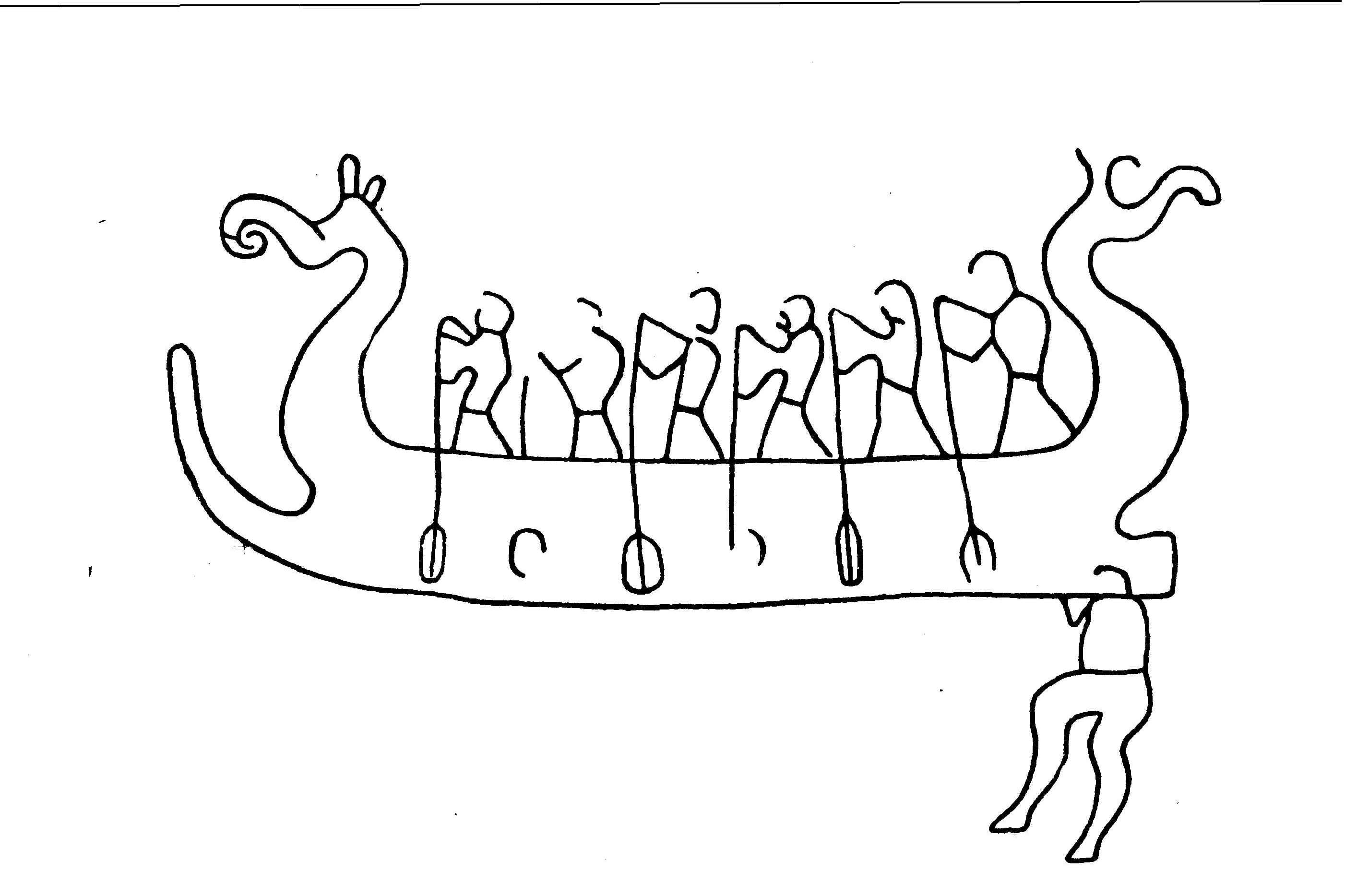 Zeichnung des Brandskogschiffs aus der älteren Eisenzeit; Felszeichnung aus Uppland in Schweden.